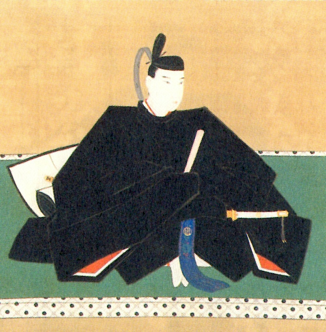 伊達斉邦の肖像。